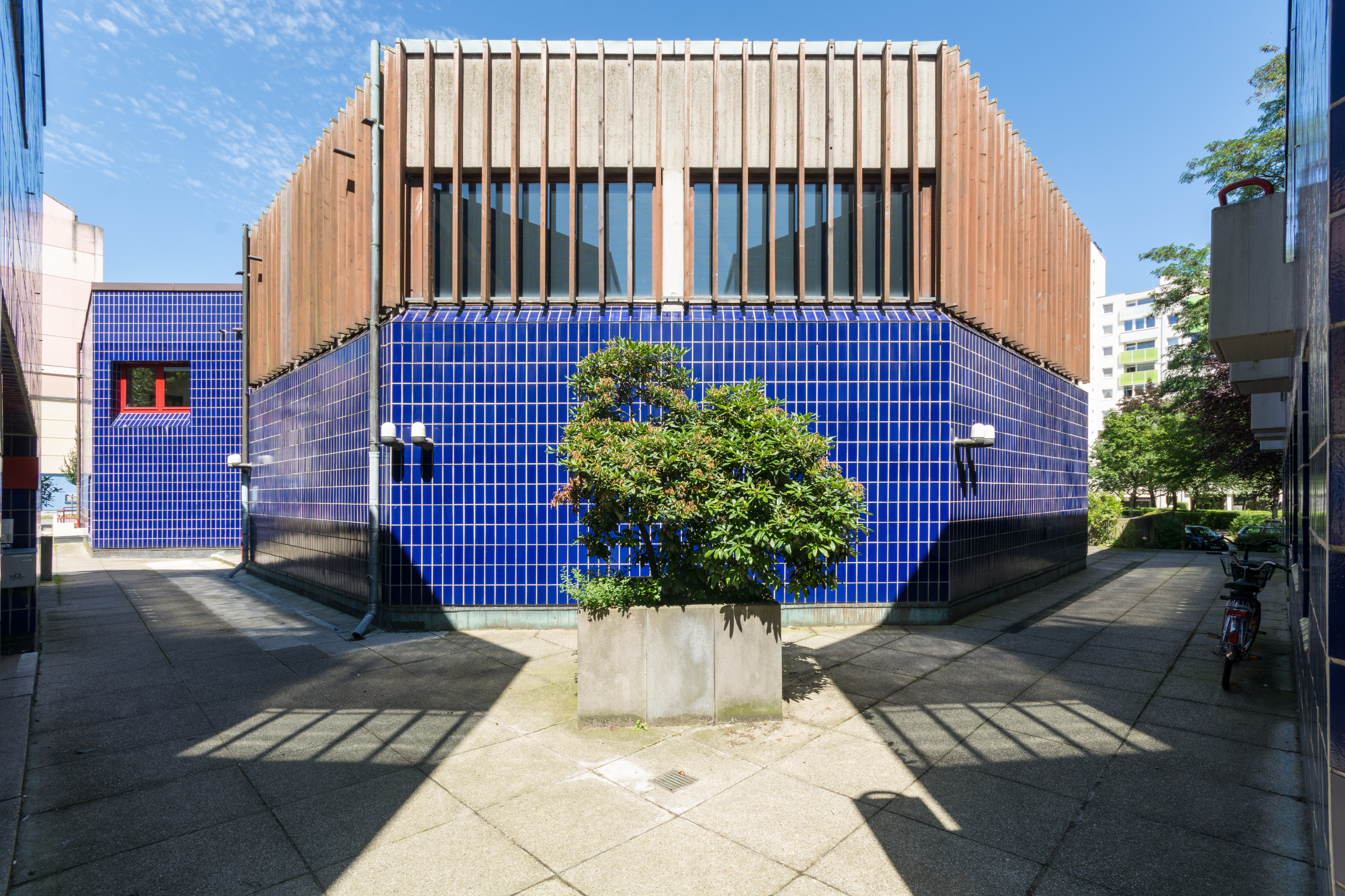 Kirchengebäude/Gemeindezentrum Martin-Luther-King-Kirche in Hamburg-Steilshoop. This is a photograph of an architectural monument.